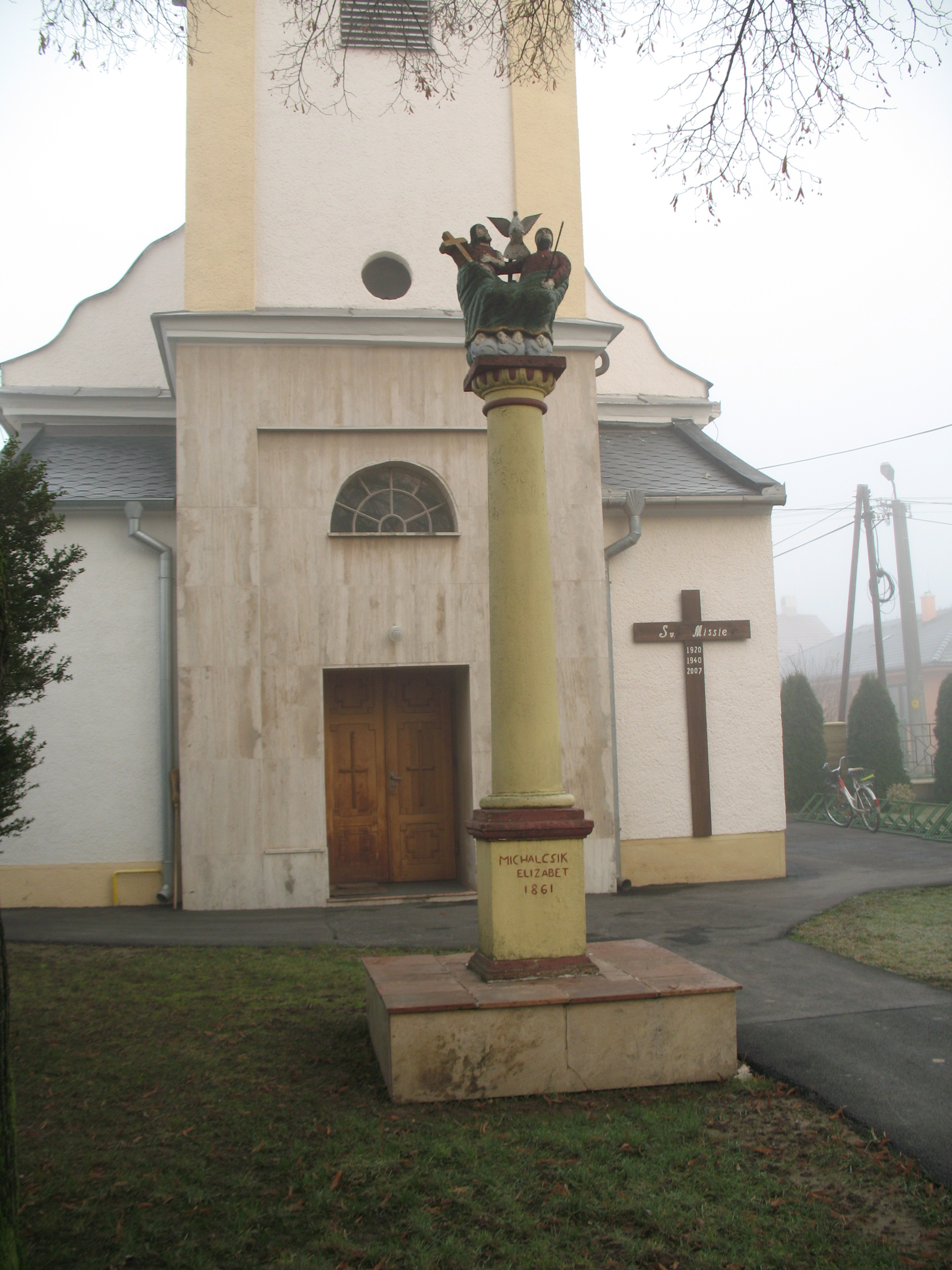 Salgó